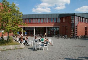 Eingang der Universitätsbibliothek Bayreuth